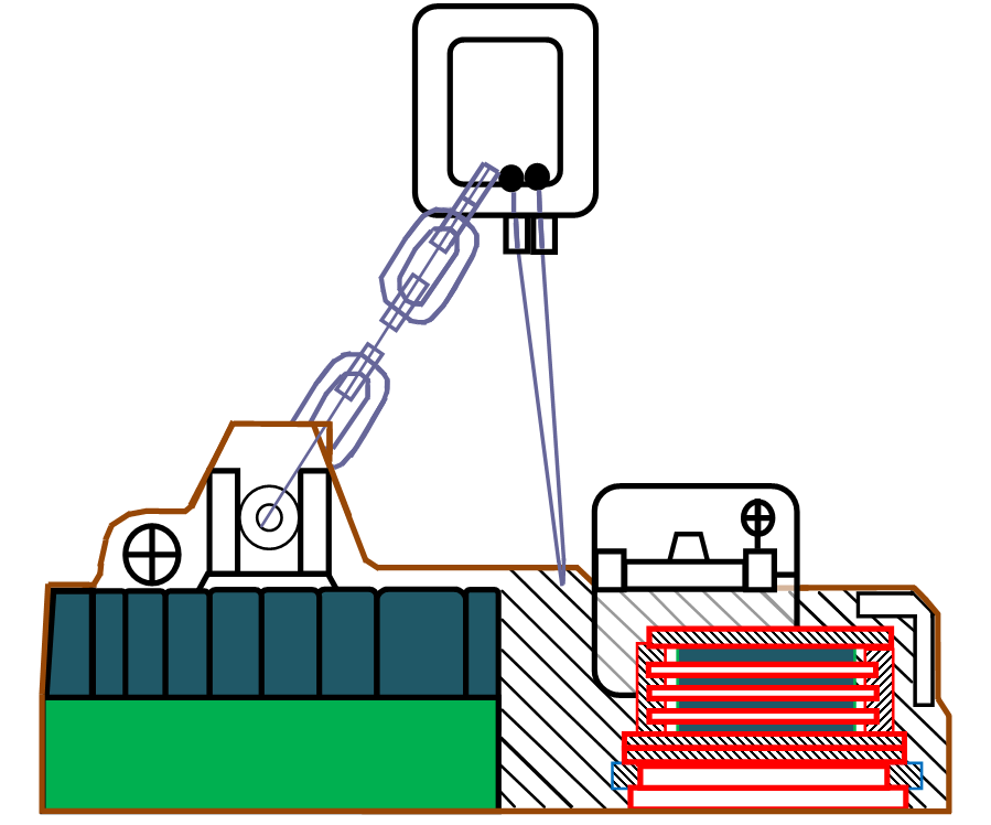 Грузовой Электромагнит - серии М (круглый)